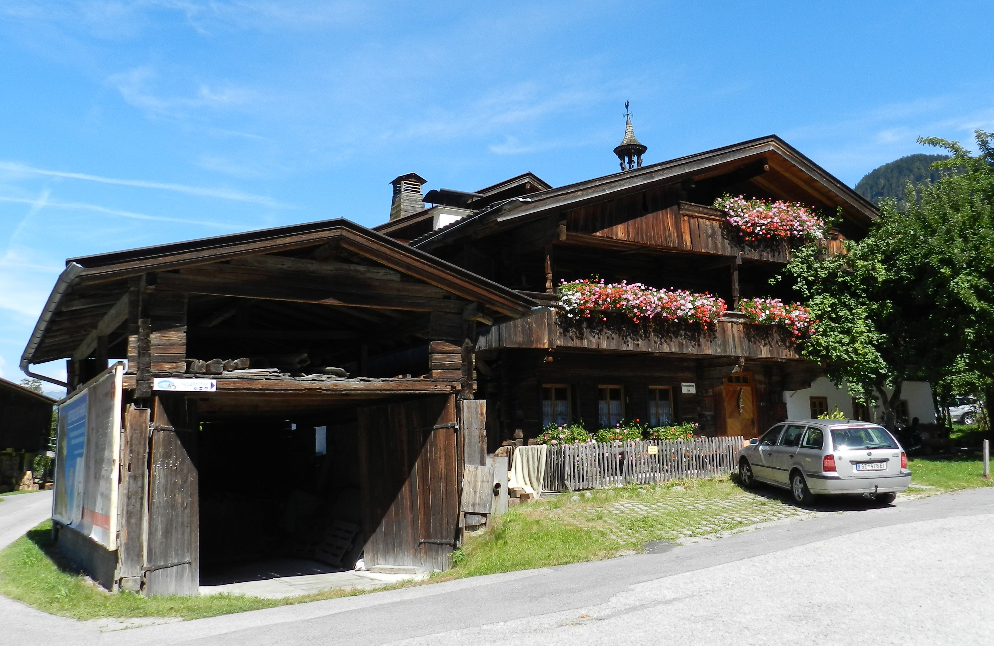 Bauernhof Gratzer (denkmalgeschützt) in Mayrhofen, Ortsteil Dorf Haus (Tirol, Österreich)